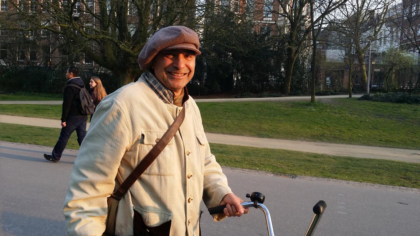 Nederlandse schrijver Halil Gür in het Vondelpark, Amsterdam 2014